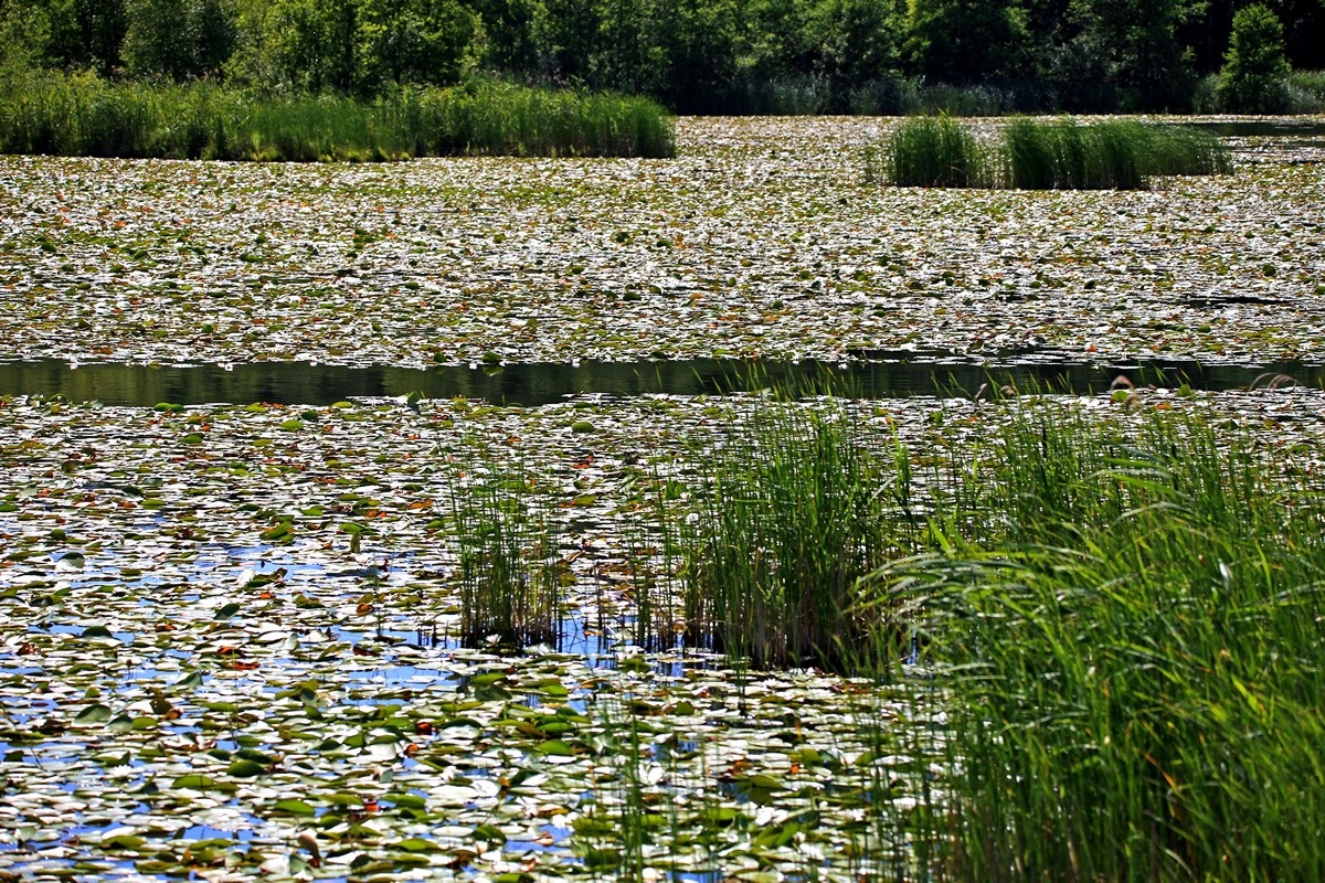 Sog. Seerosenparadies im Kleinen Kotzower See bei Mirow